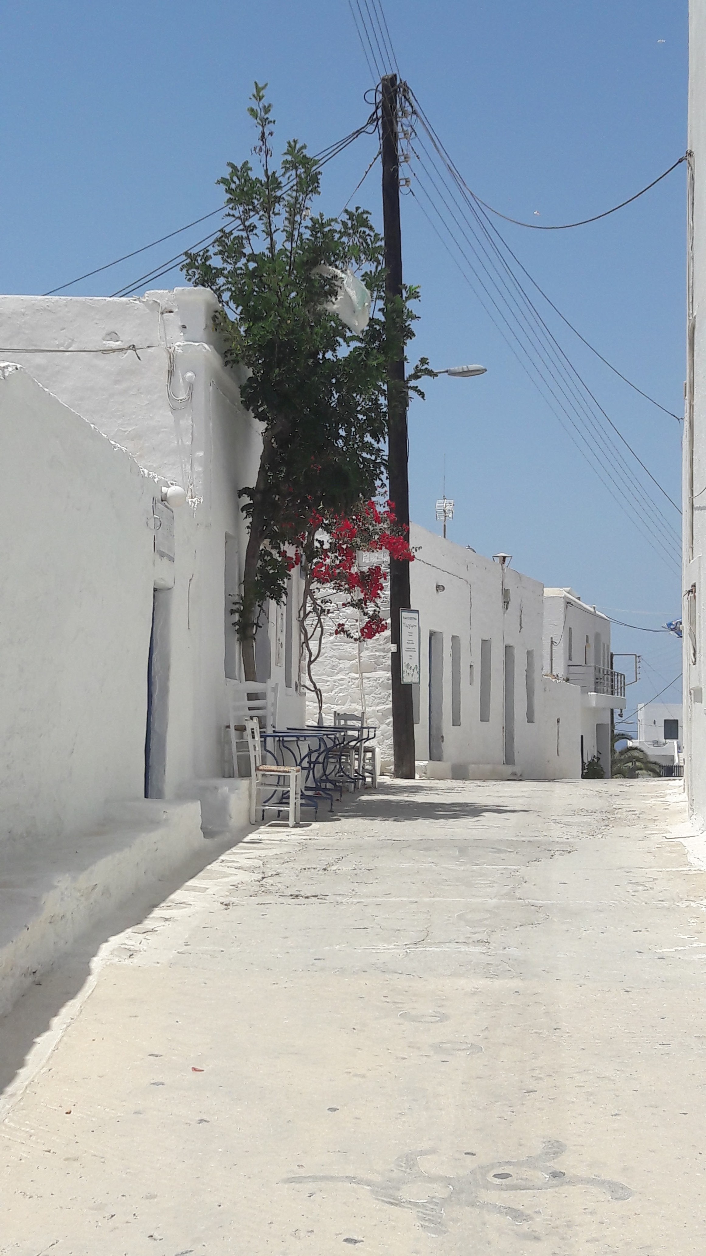 Χώρα Σχοινούσας